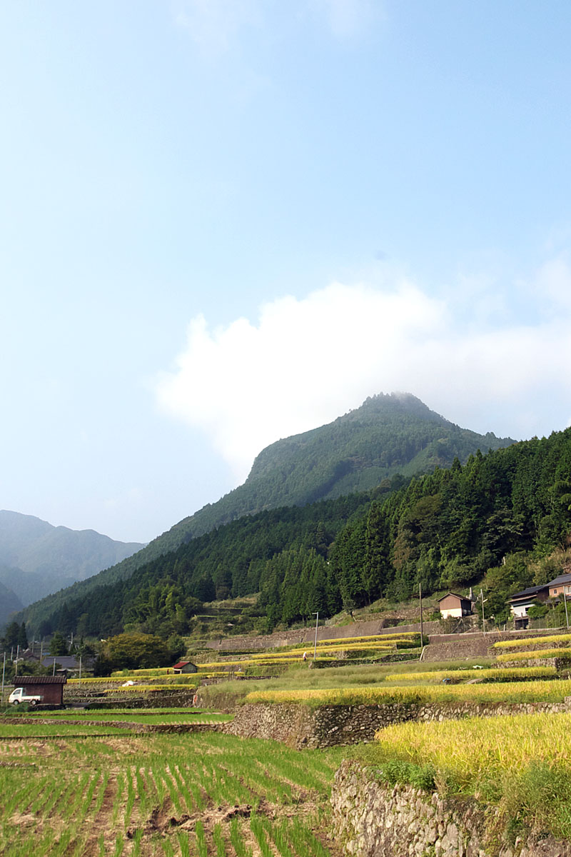 求菩提山遠景。日本、福岡県、豊前市。